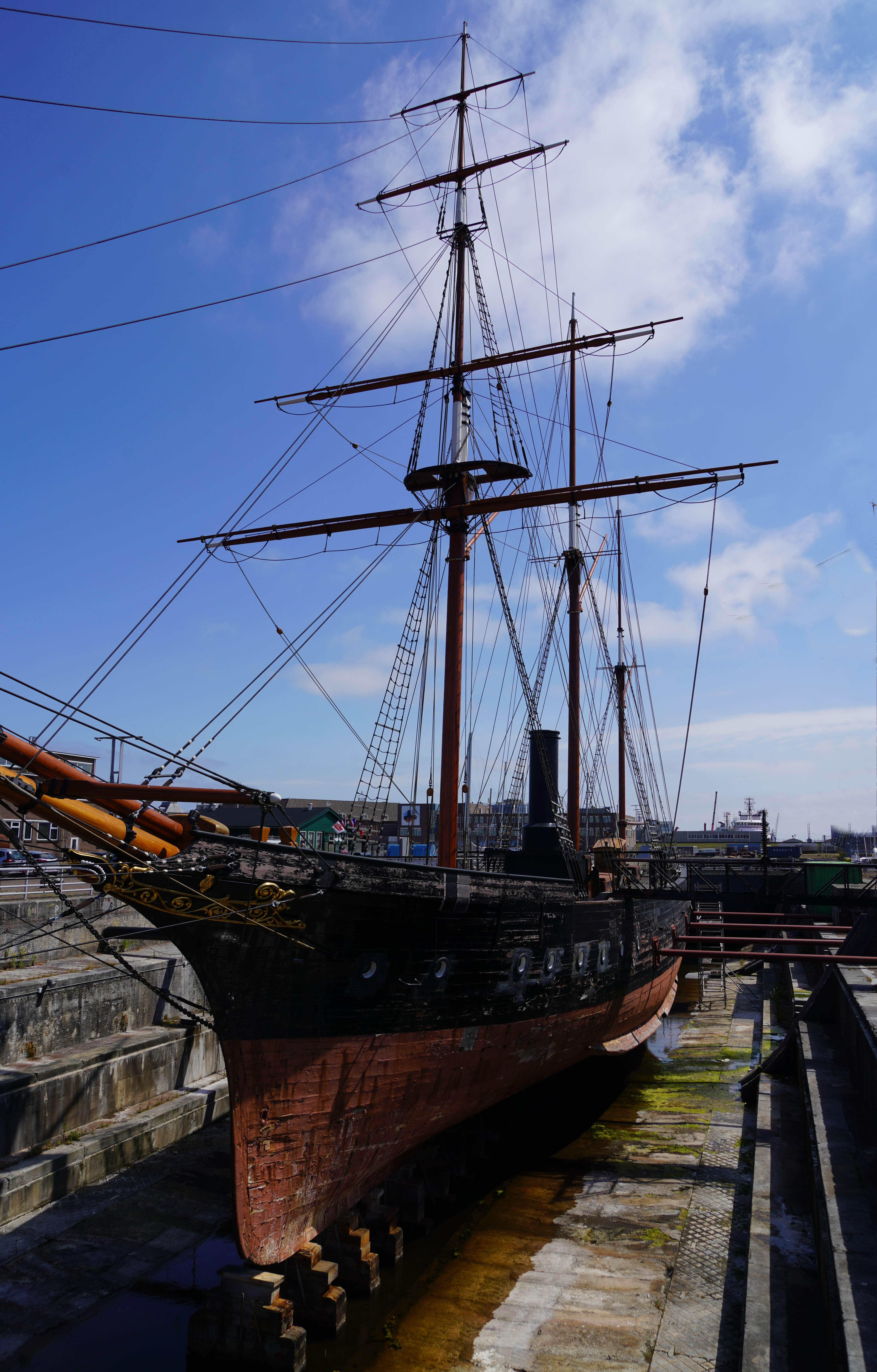 Zr.Ms Bonaire (2)